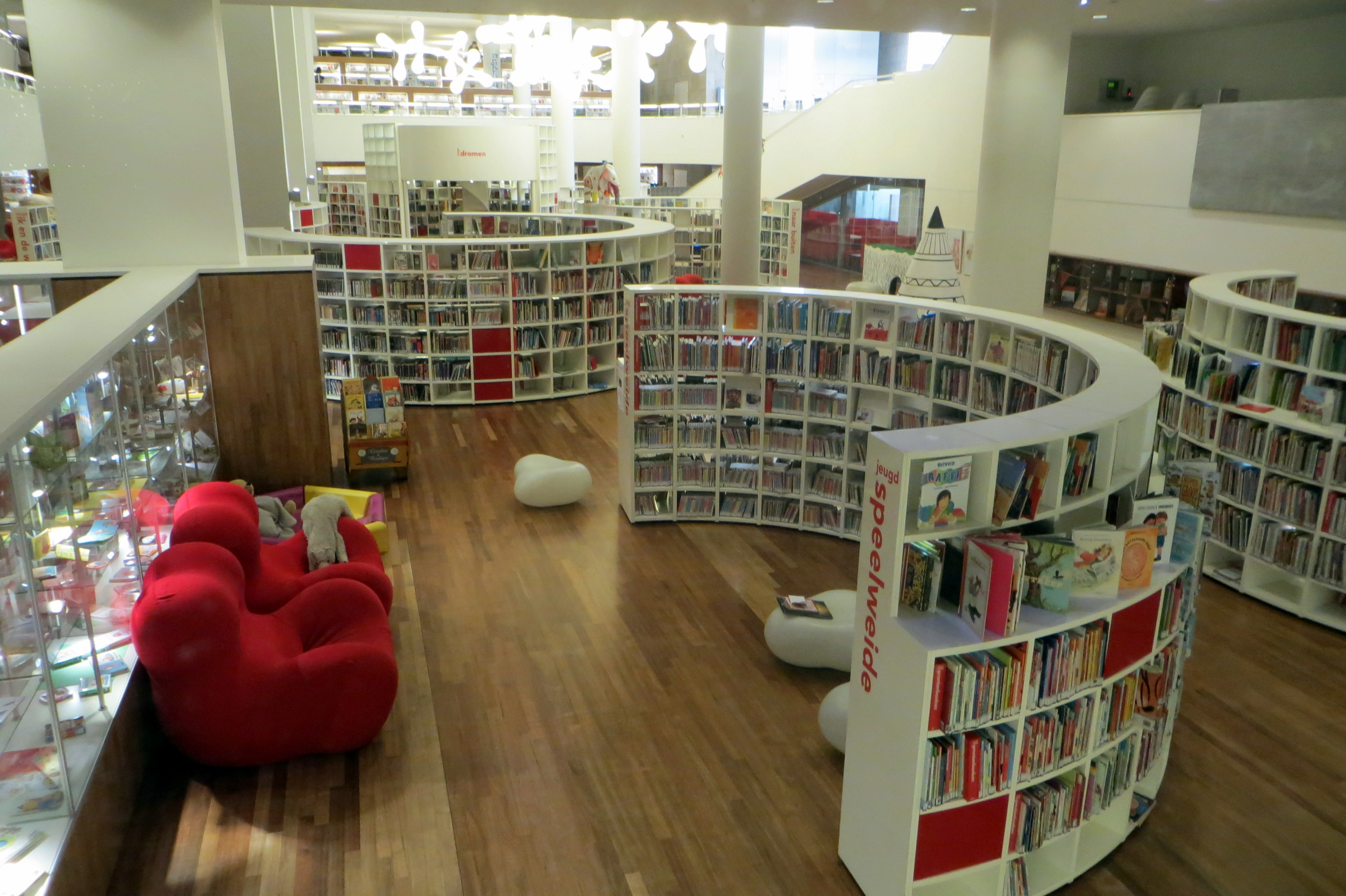 Одна з зал Амстердамської бібліотеки